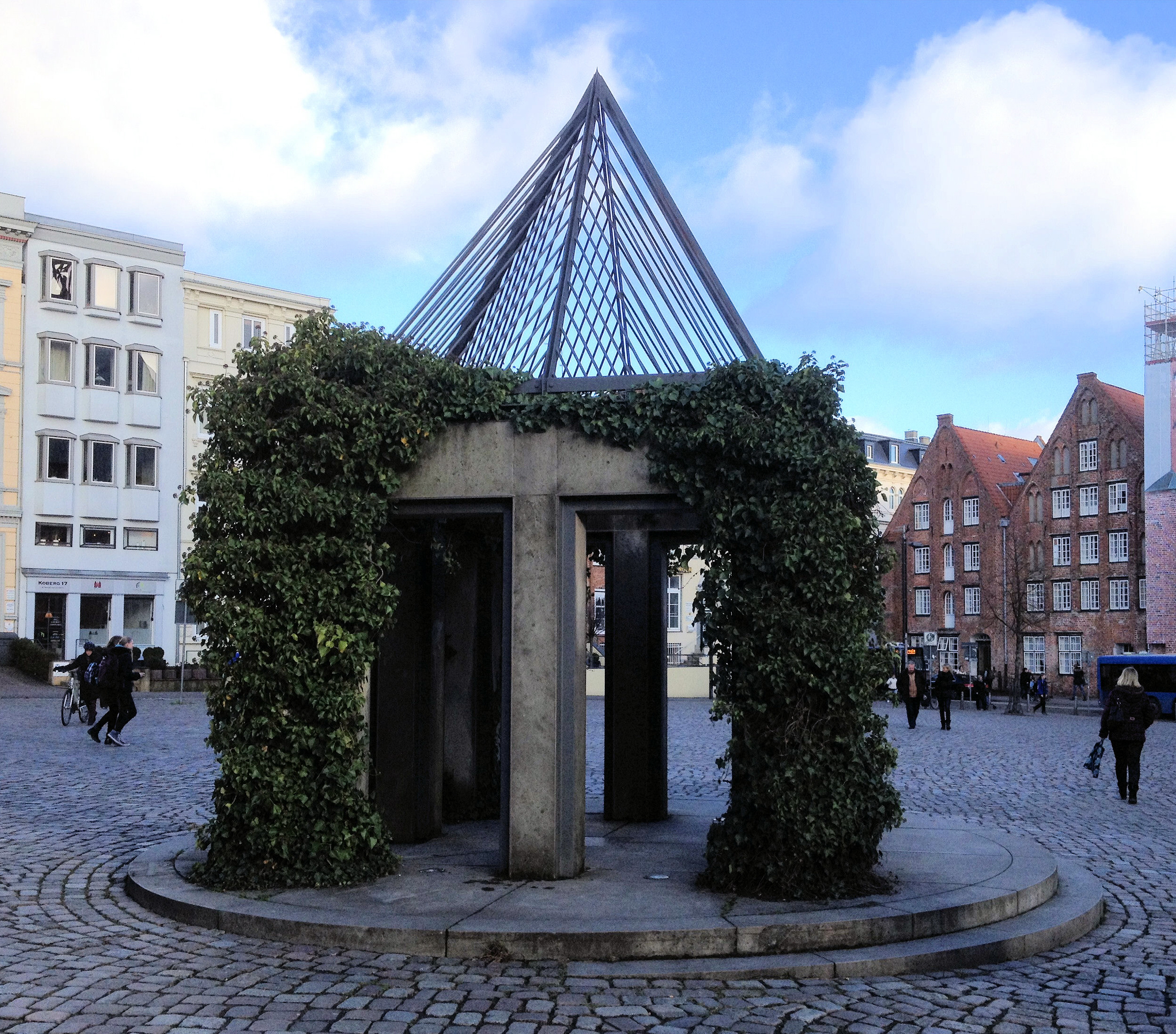 Das 1997 errichtete neue Burrecht auf dem Lübecker Koberg